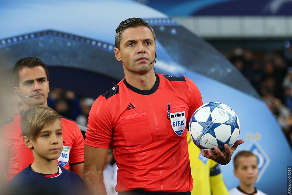 20.10.2015 Kyiv, Olimpiyskiy National Sports Complex Champions League. Group stage. FC Dynamo Kyiv - Chelsea - 0:0 Chelsea (4-2-3-1): Begovic; Zouma, Cahill, JT (c), Azpilicueta; Ramires, Matic; Willian, Fabregas (Oscar 75), Hazard; Diego Costa. Unused subs Blackman, Baba, Mikel, Traore, Kenedy, Falcao. Booked Zouma 67 Dynamo Kiev (4-1-4-1): Shovkovskiy; Danilo Silva, Khacheridi, Dragovic, Vida; Rybalka; Yarmolenko, Sydorchuk, Buyalskiy (Garmesh 83), Gonzalez; Kravets (Junior Moraes 78). Unused subs Rybka, Antunes, Petrovic, Gusev, Miguel Veloso. Booked Buyalskiy 65 20.10.2015 г.Киев. НСК "Олимпийский". Лига Чемпионов. Групповой этап Динамо — Челси 0:0 Динамо: Шовковский — Данило Силва, Драгович, Хачериди, Вида — Рыбалка, Буяльский (Гармаш, 83) — Ярмоленко, Сидорчук, Гонсалес — Кравец (Мораес, 78) Челси: Бегович — Аспиликуэта, Терри, Кэхилл, Зума — Матич, Рамирес — Виллиан, Фабрегас (Оскар, 75), Азар — Д. Коста Предупреждения: Буяльский — Зума